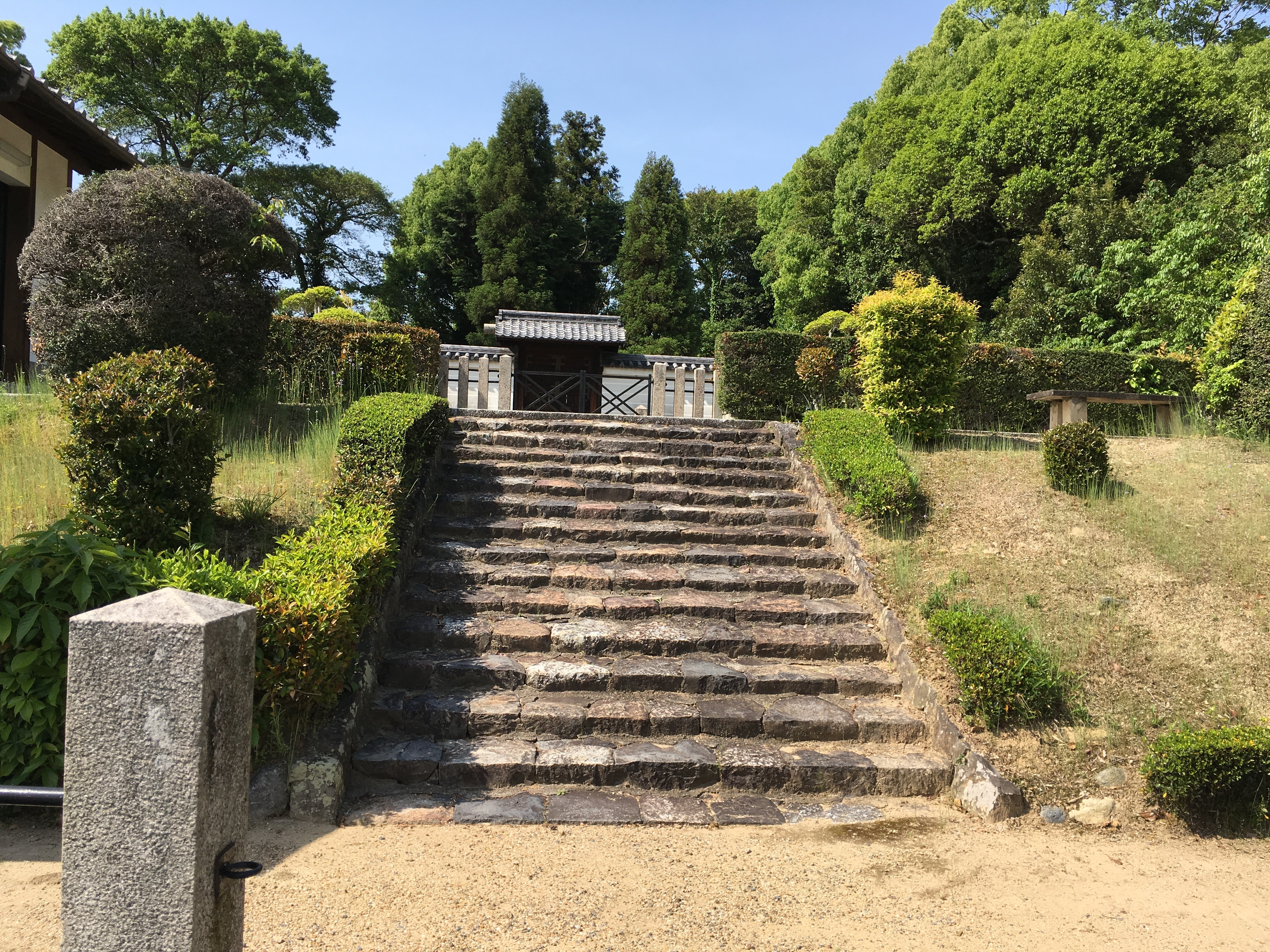 崇道天皇陵遠景